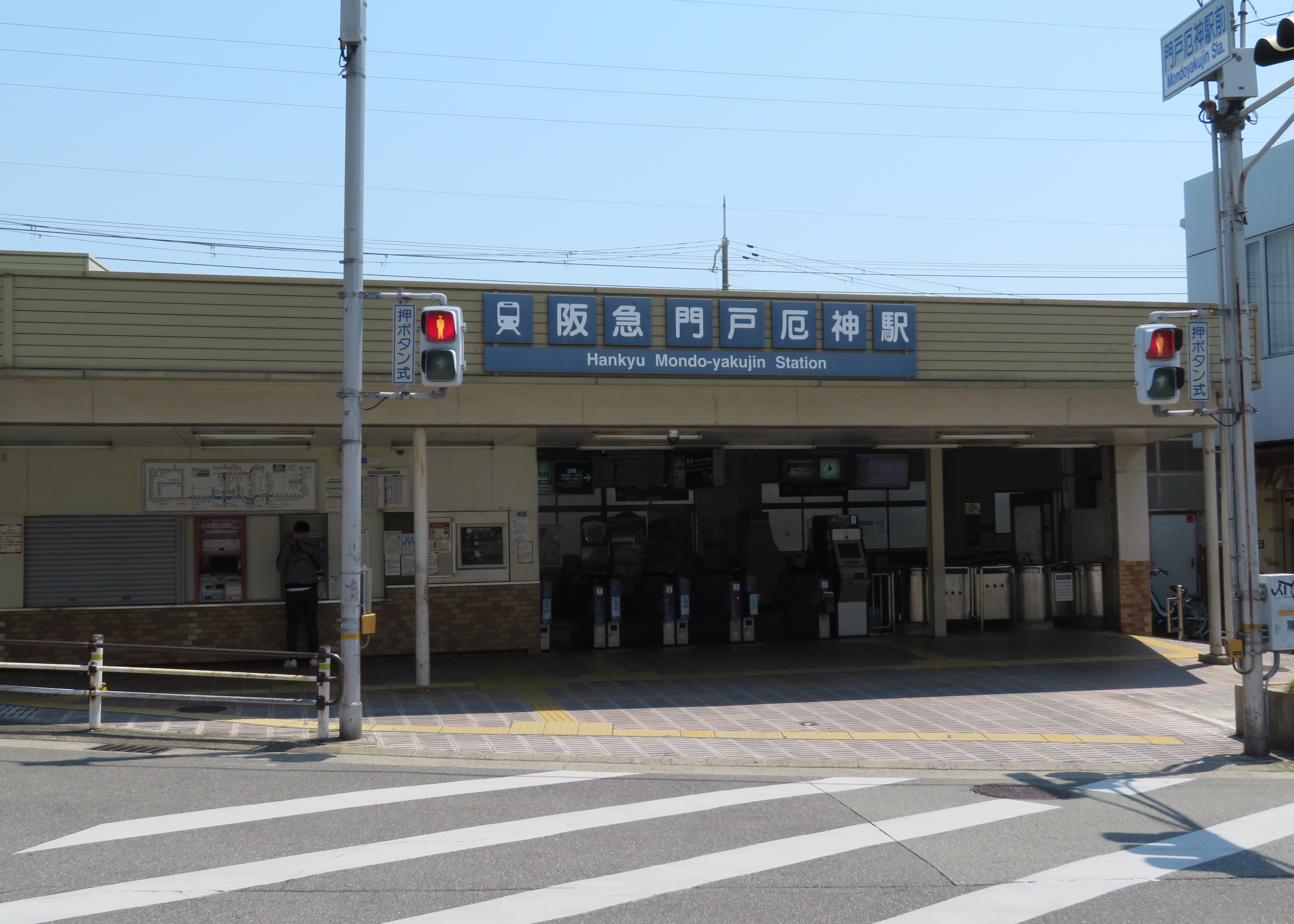 阪急電鉄門戸厄神駅